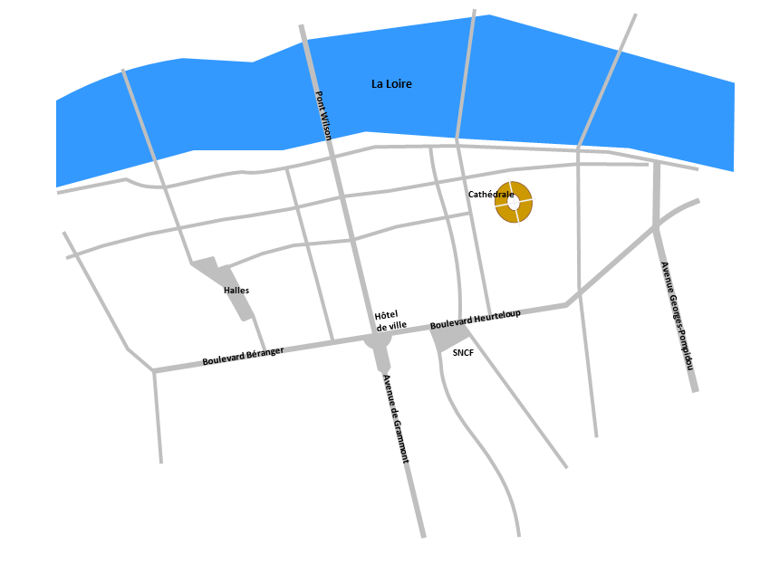 plan moderne de Tours et amphithéâtre